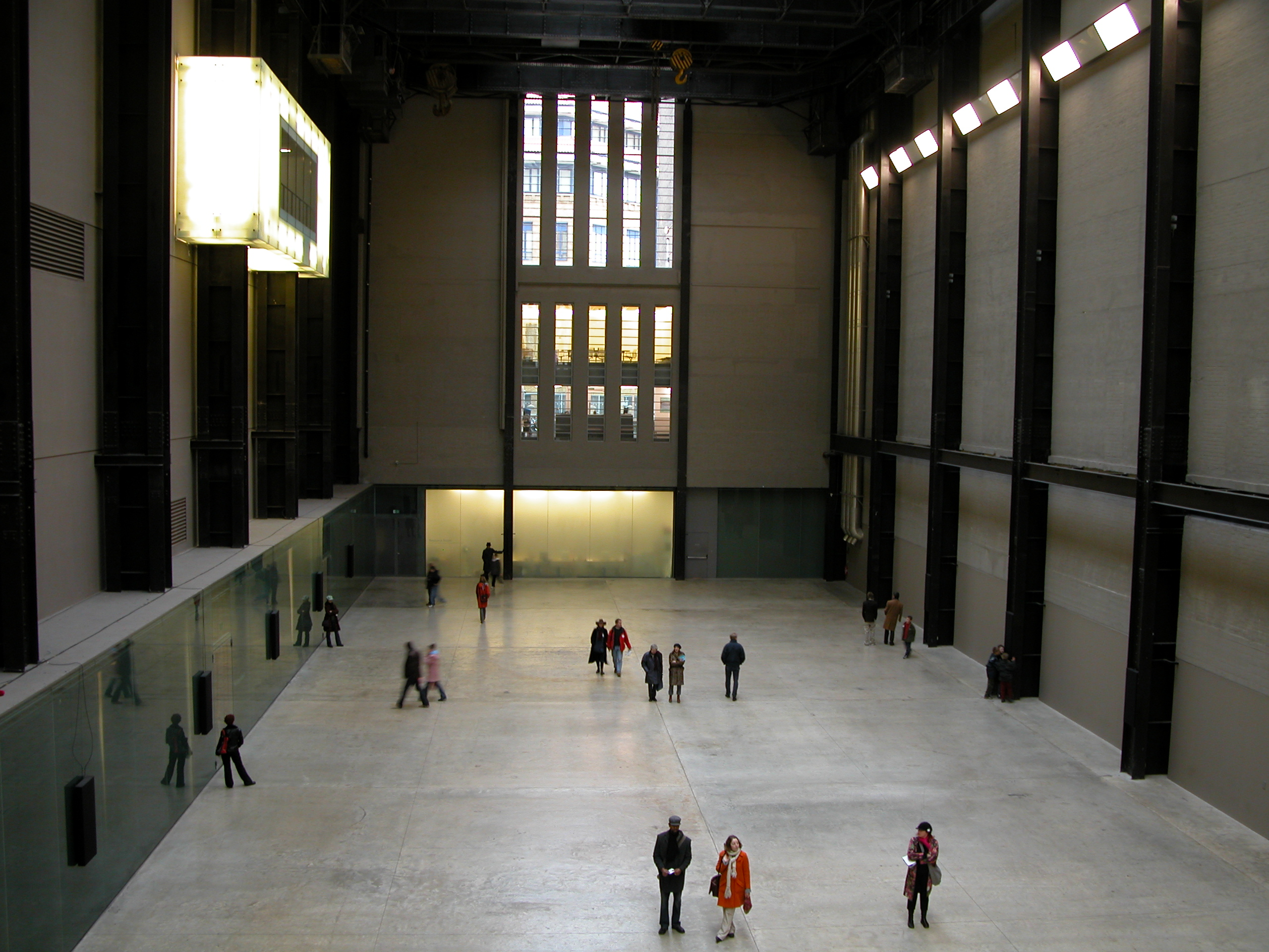 Tate Modern, in London